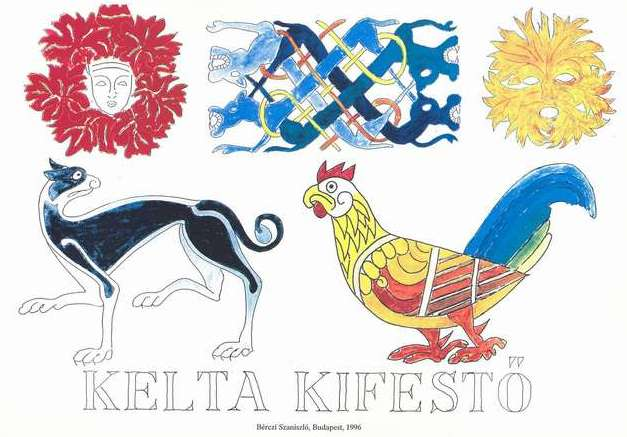 Emberarcok és állatalakok a kelta művészetben